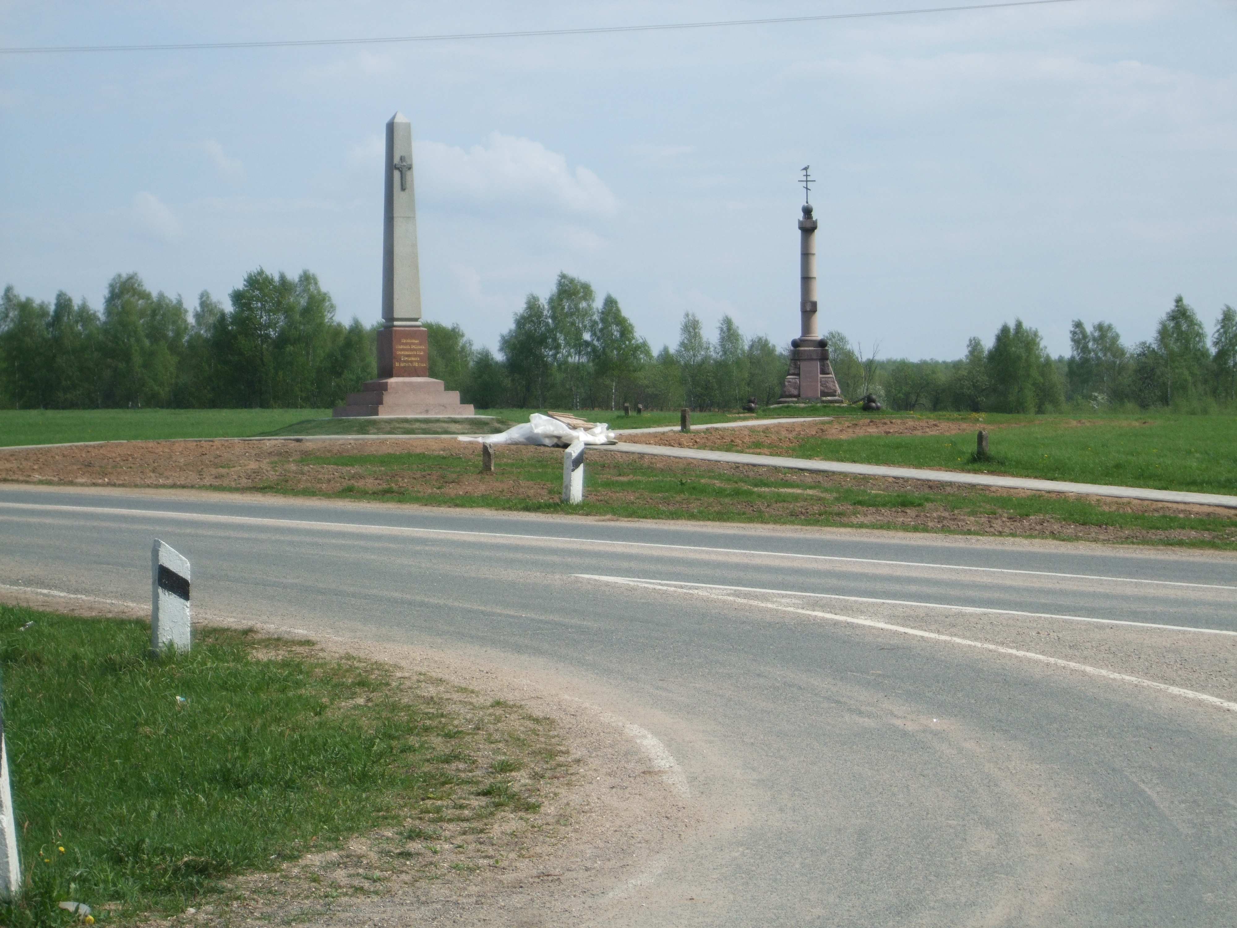 Dois dos muitos monumentos militares nos campos de Borodino